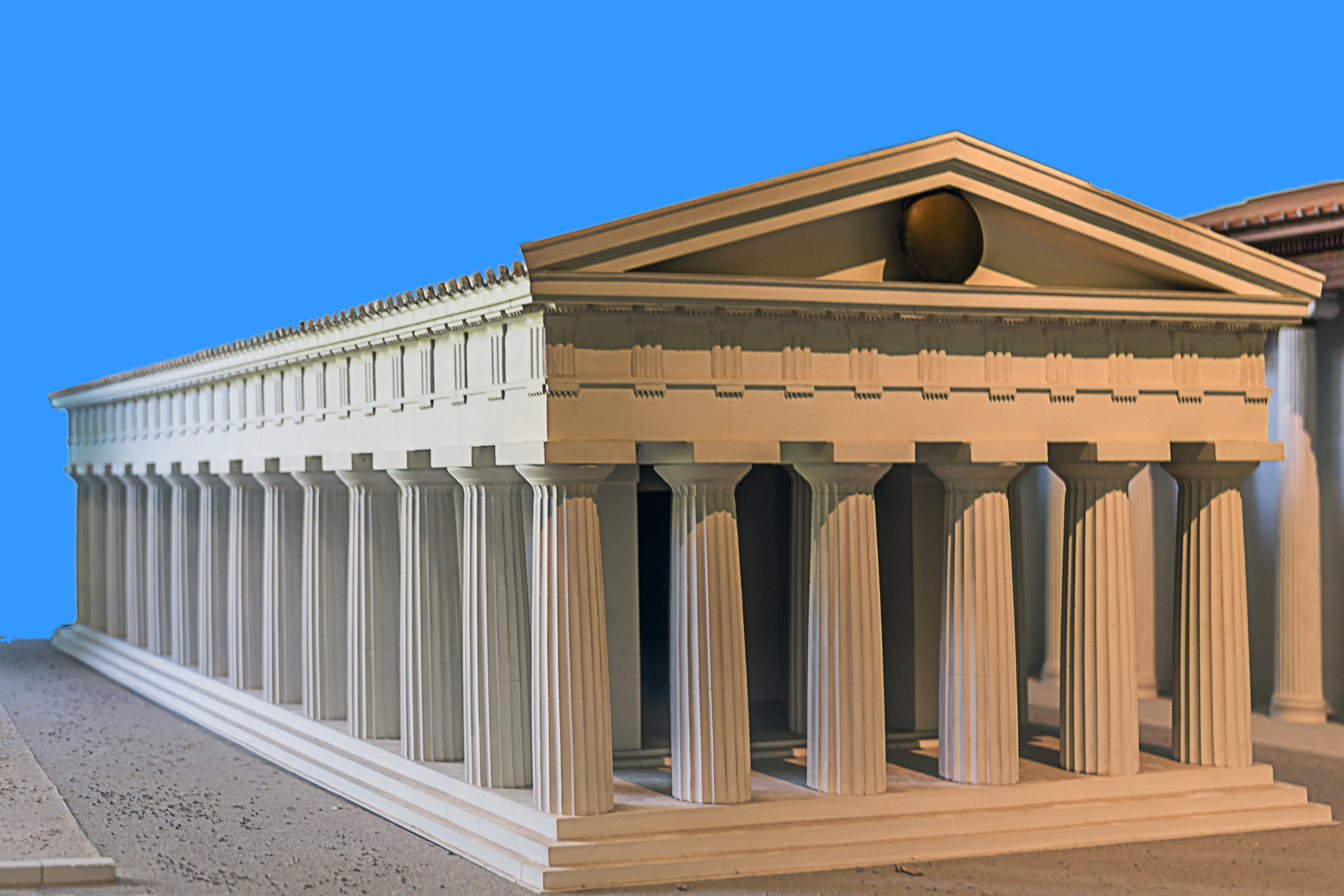 Modellrekonstruktion vom Athenatempel (Syrakus) im Museo Paolo Orsi